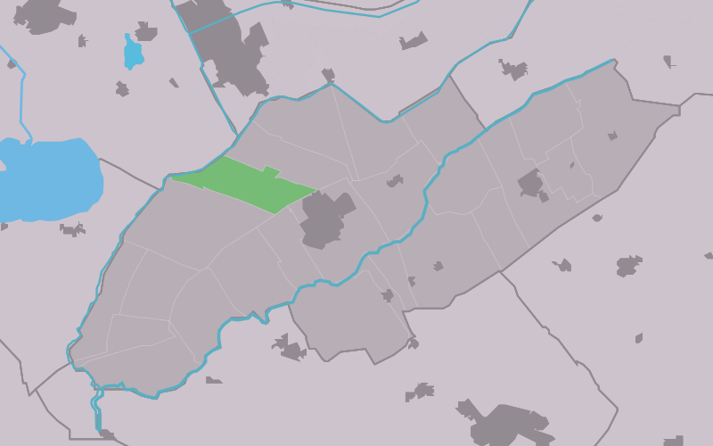 Kaartsje fan himrik fan Nijlemmer